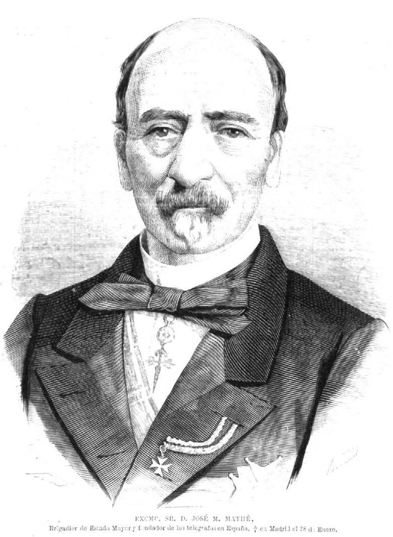 José M. Mathe. Brigadier de Estado Mayor y fundador de los telégrafos en España. La Ilustración Española y Americana, Madrid, 30 de abril de 1875